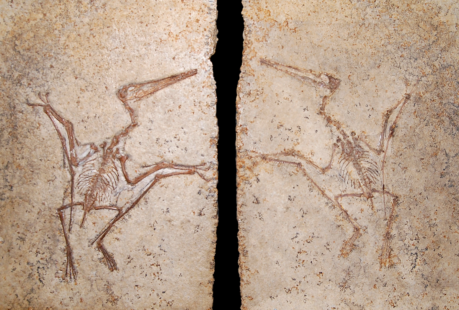 Naturhistorisches Museum Wien